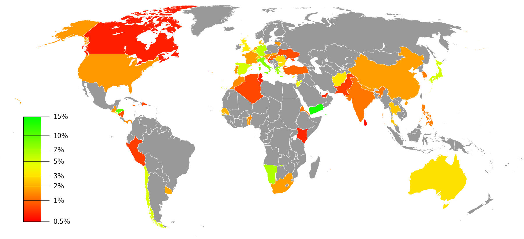 Karta zemalja s više od 0,5% udjela proizvedene energije iz solarne energije.